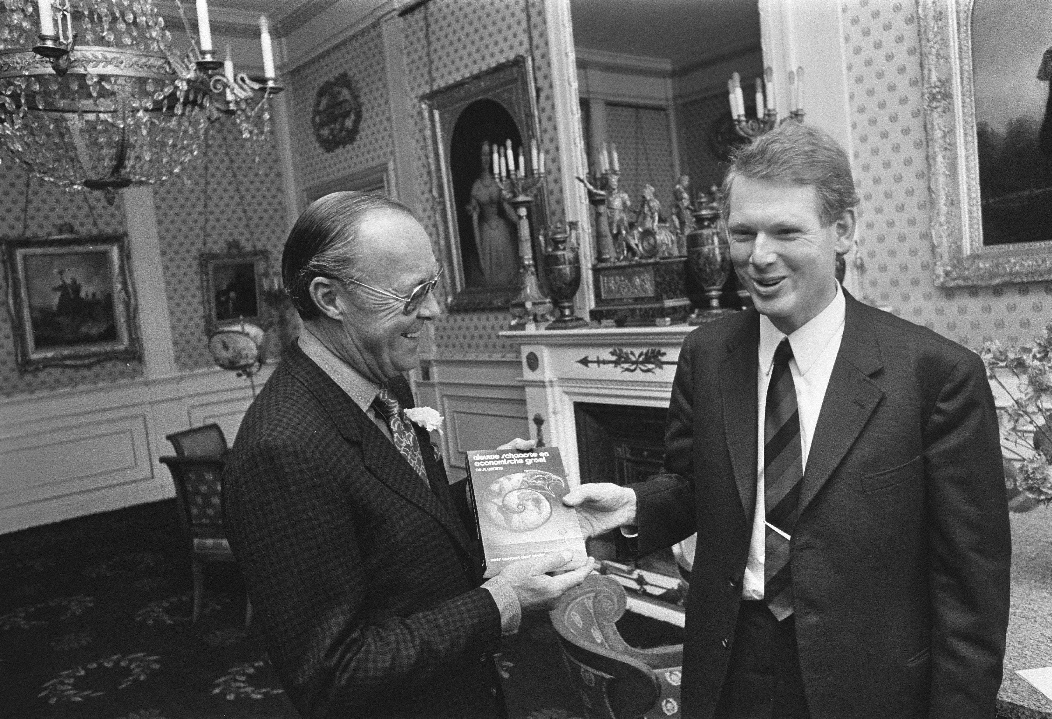 Collectie / Archief : Fotocollectie Anefo Reportage / Serie : [ onbekend ] Beschrijving : Prins Bernhard ontving exemplaar van drs. Hueting , van diens proefschrift "Nieuwe schaarste en economische groei" op Soestdijk Datum : 1 mei 1974 Trefwoorden : ontvangsten, prinsen Persoonsnaam : Bernhard, prins Fotograaf : Verhoeff, Bert / Anefo Auteursrechthebbende : Nationaal Archief Materiaalsoort : Negatief (zwart/wit) Nummer archiefinventaris : bekijk toegang 2.24.01.05 Bestanddeelnummer : 927-1646